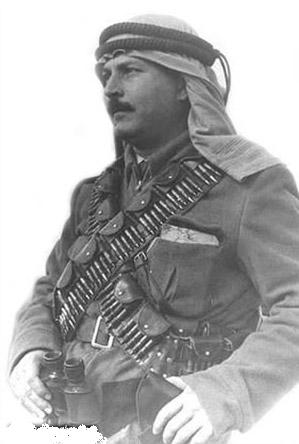 I received this photo by email and it have no any copyright